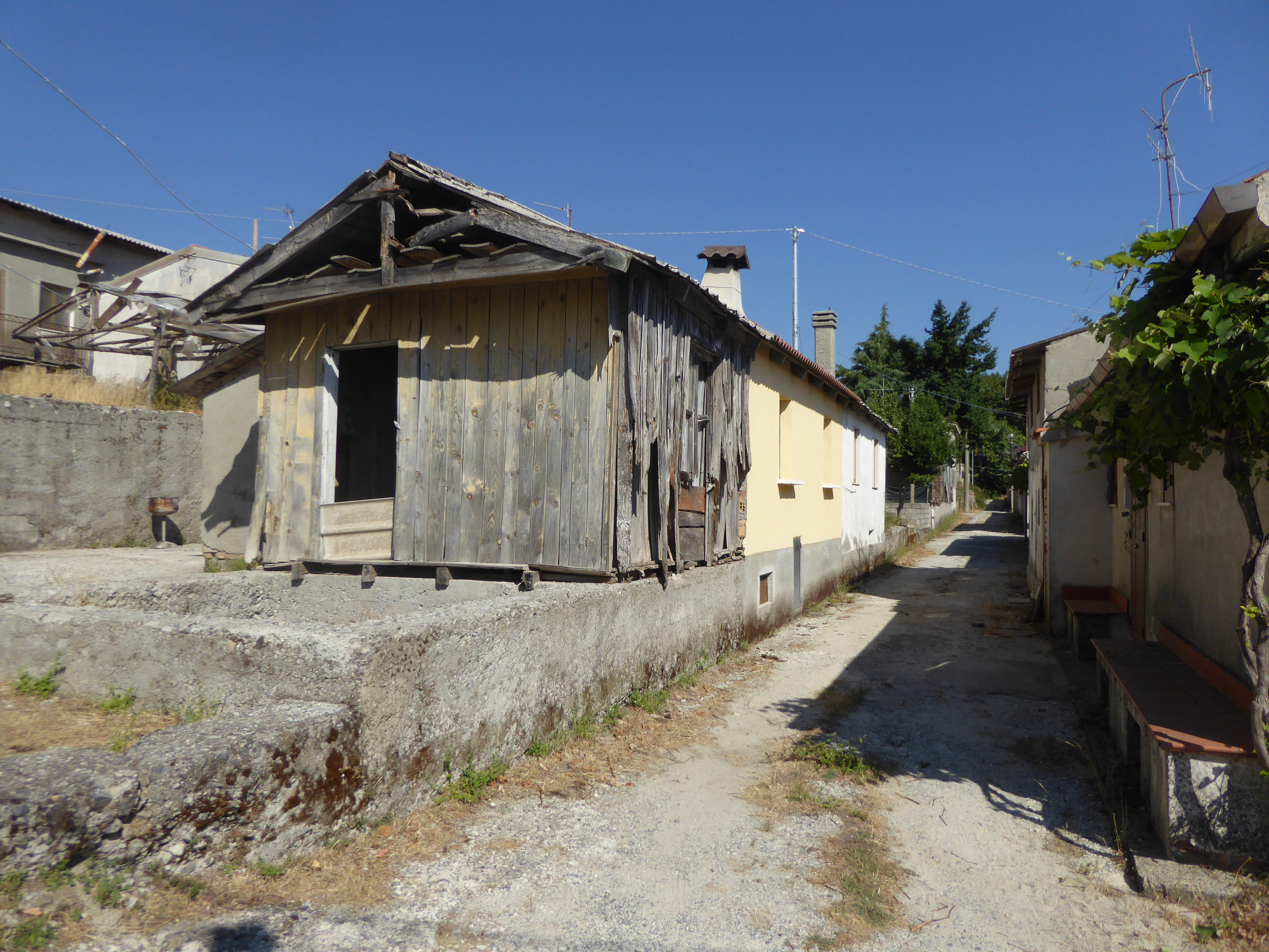 Casa in legno della Ziia creata per gli sfollati degli anni '50 (agosto 2019)